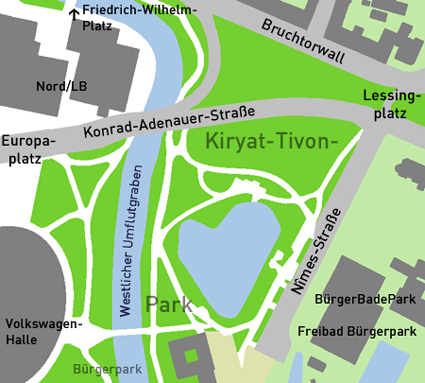 Karte des Kiryat-Tivon-Parks in Braunschweig. Grafik selbst erstellt.